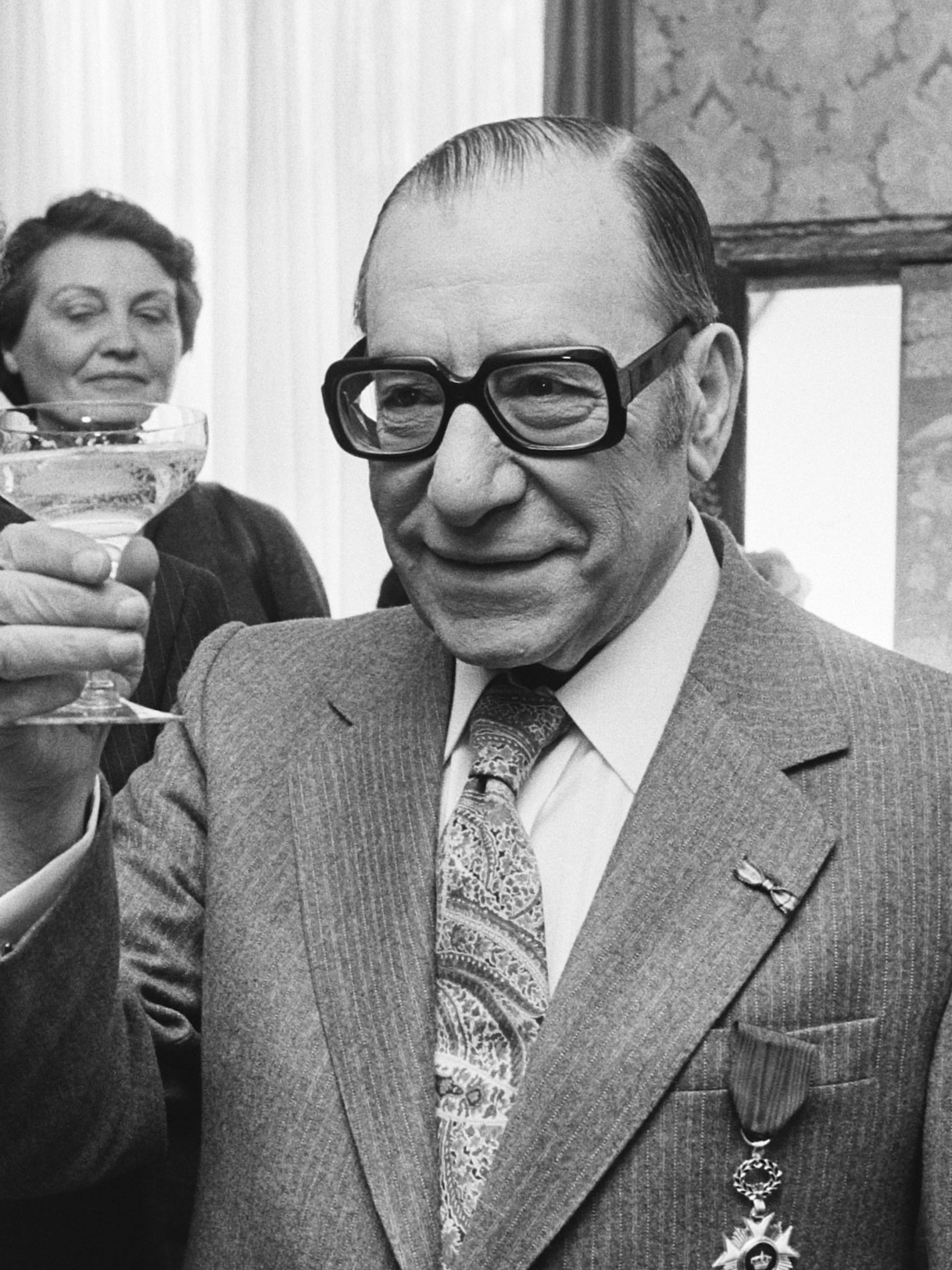 Zanger Bob Scholte krijgt Belgische onderscheiding; Ridder in de Kroonorde op het Belgische Consulaat in Amsterdam 21 februari 1980